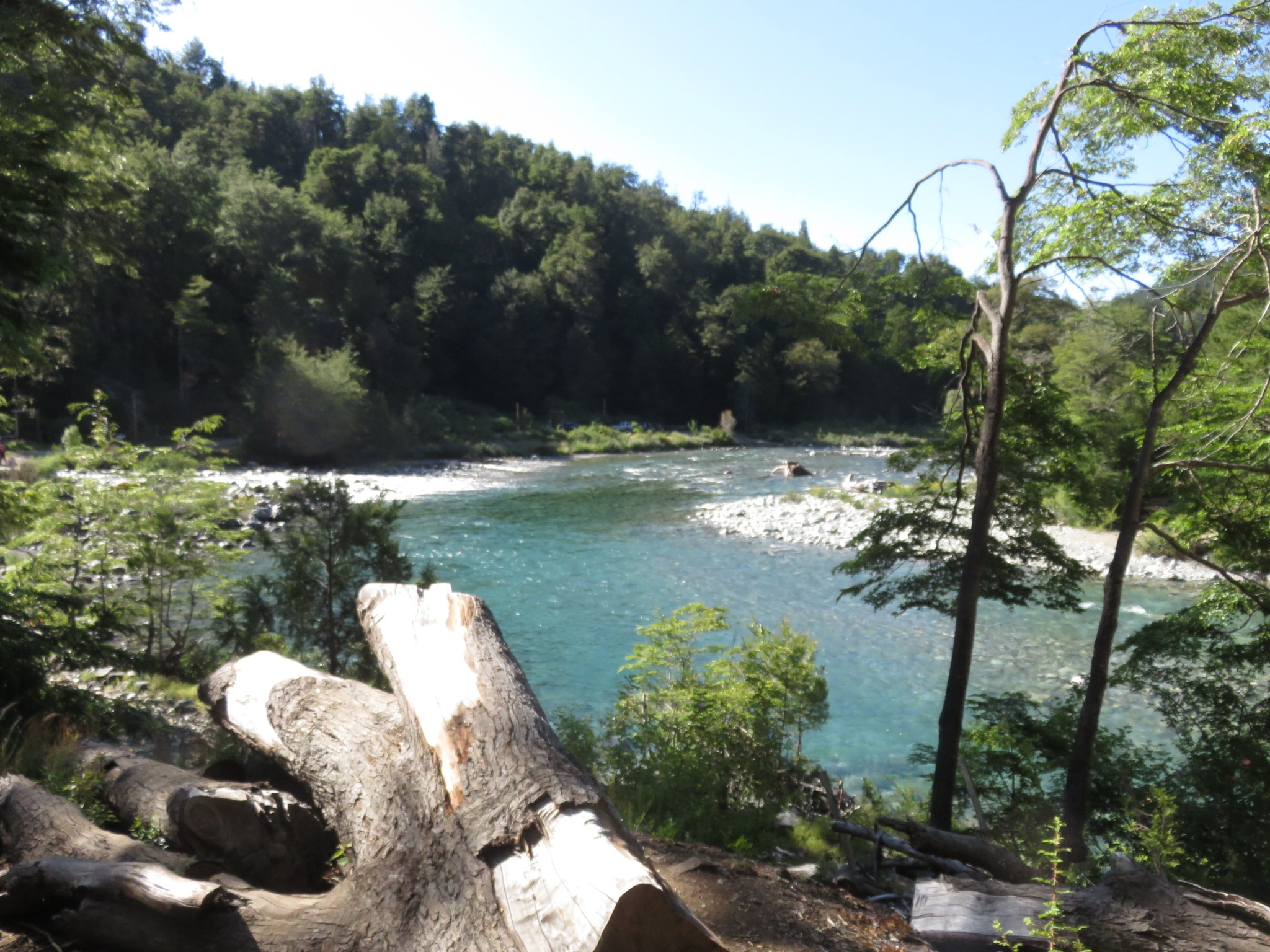 Esta imagen es del recorrido del Río Azul camino a refugio de montaña Cajón del Azul. Se puede observar la belleza del paisaje